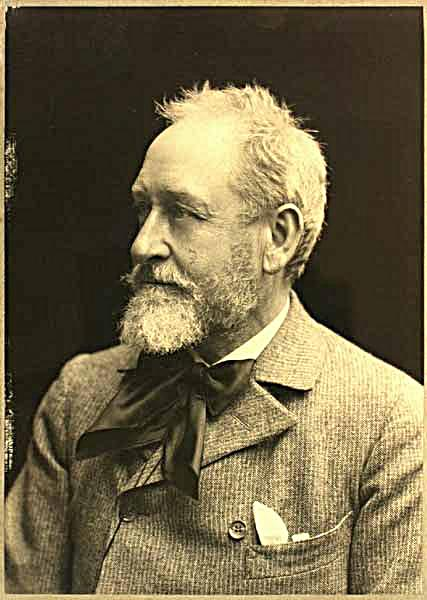 Photo